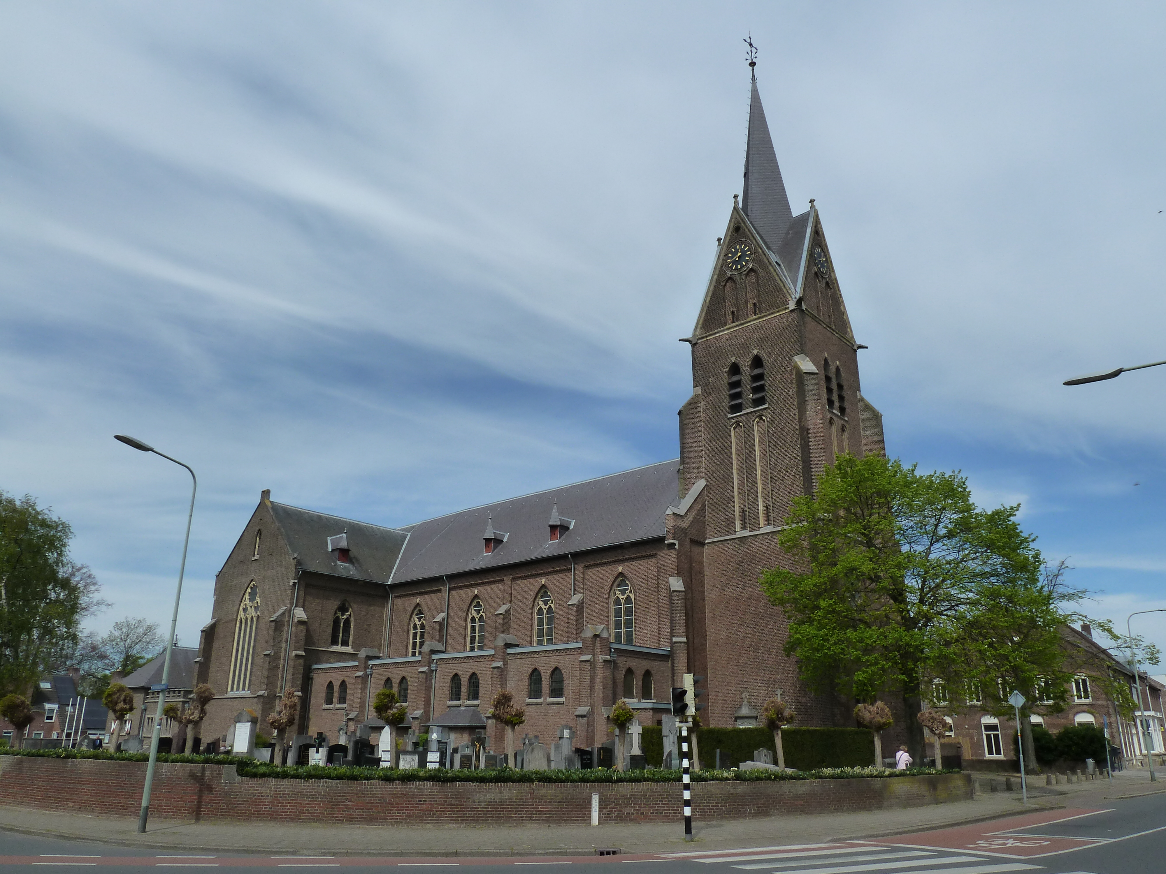 Sint-Walburgakerk, Amby, Maastricht, Limburg, Nederland